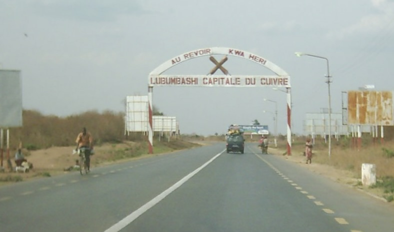 Leaving Lubumbashi